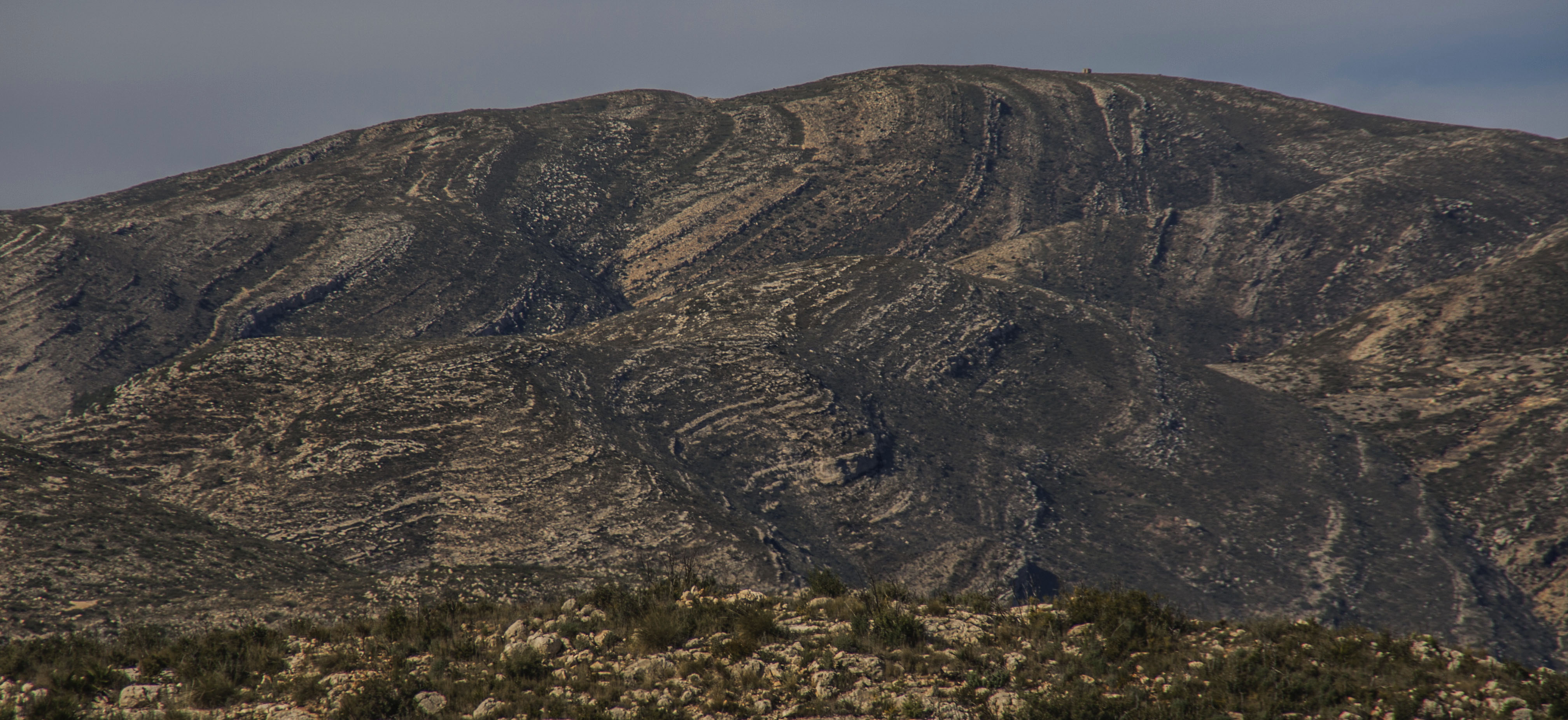 La Colaita, amb 827 metres, és la muntanya més alta de la serra del Caballó.